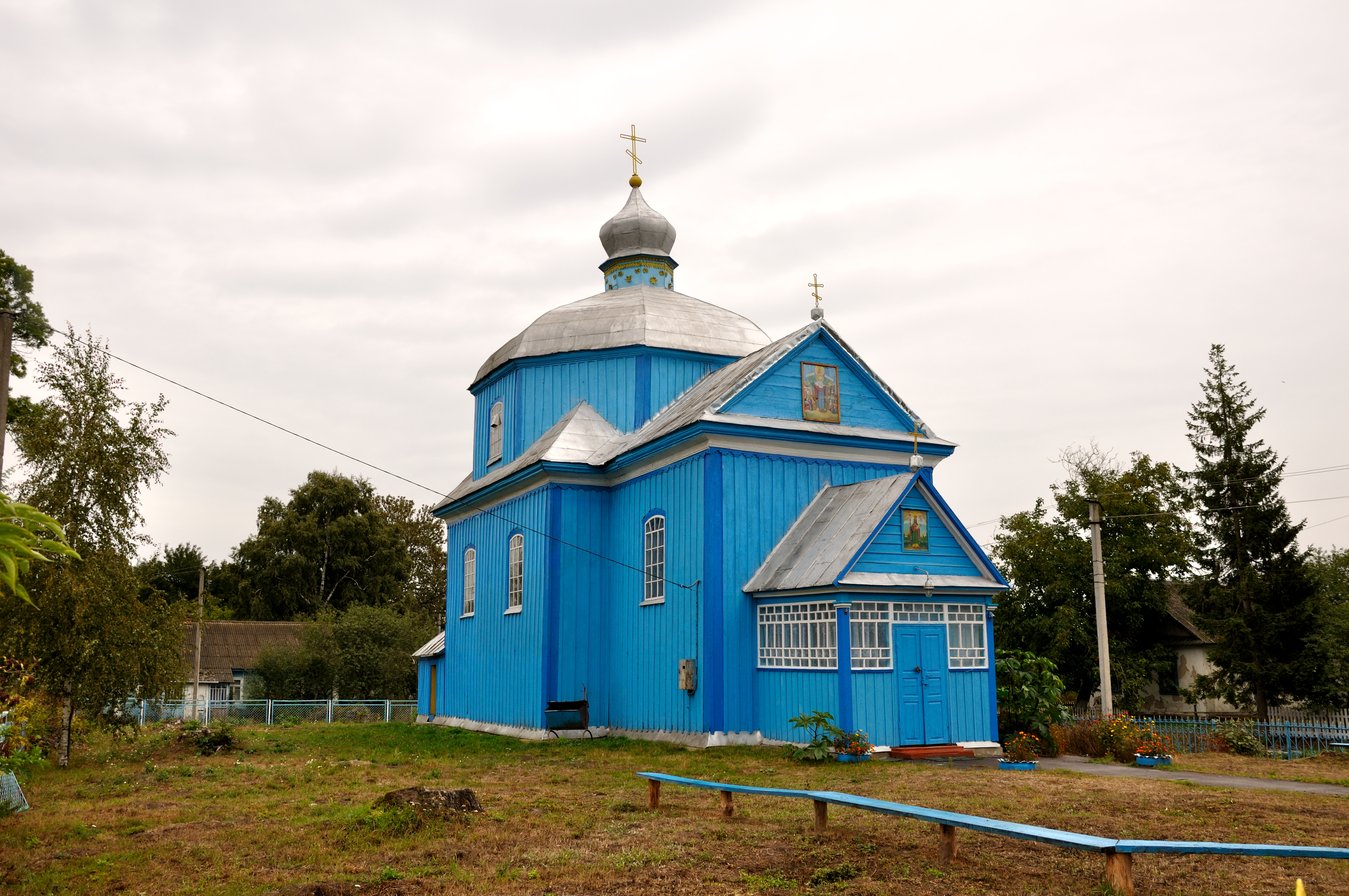 Церква Параскеви (дер.), с.Липки